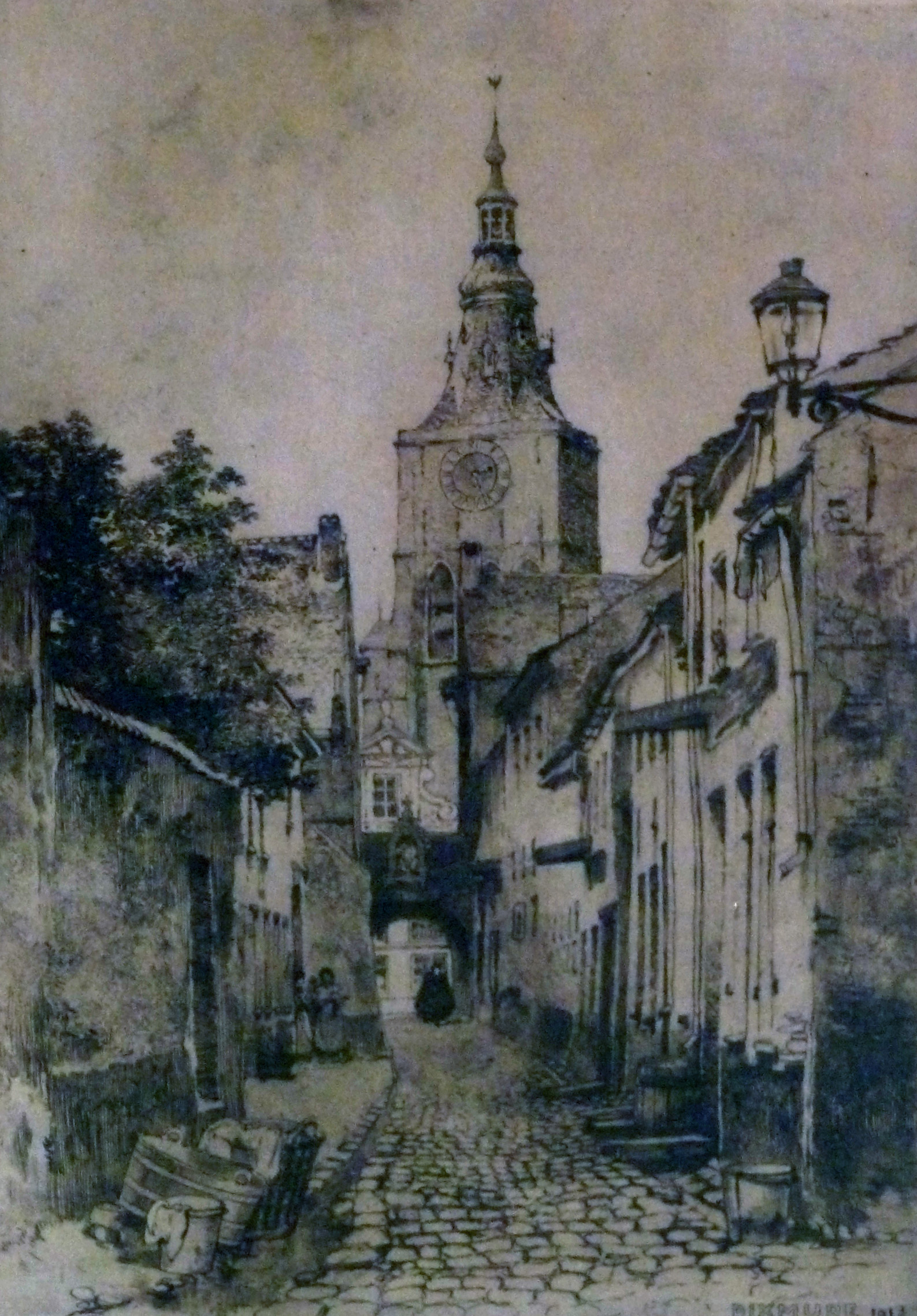 "Diksmiide" (1913); ets door de Belgische kunstschilder Louis Titz (1859-1932); privébezit